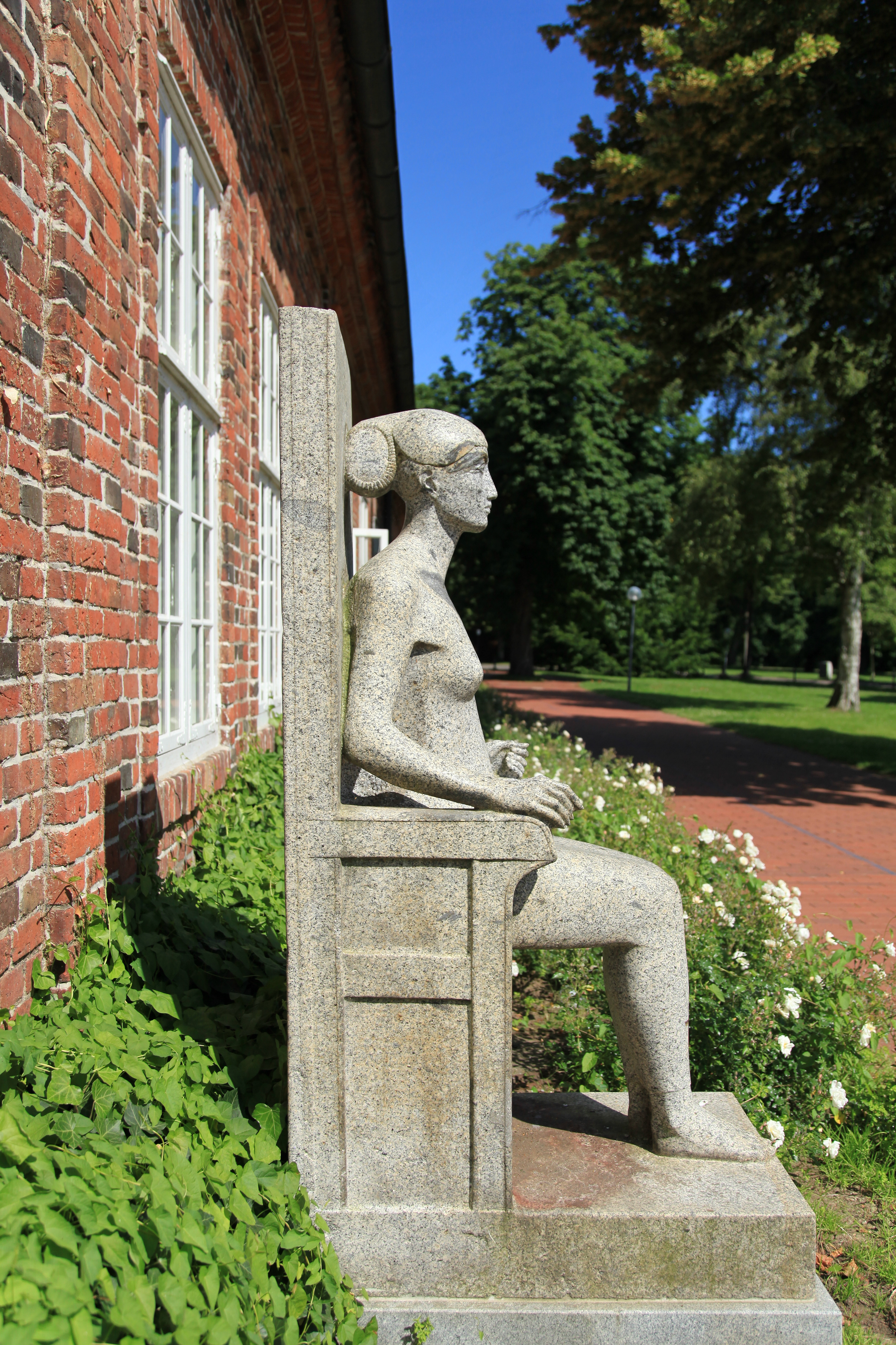 Sitzende weibliche Figur (Klaus Kütemeier, 1966/67), vor dem Niederen Arsenal, Am Stadtsee in Rendsburg